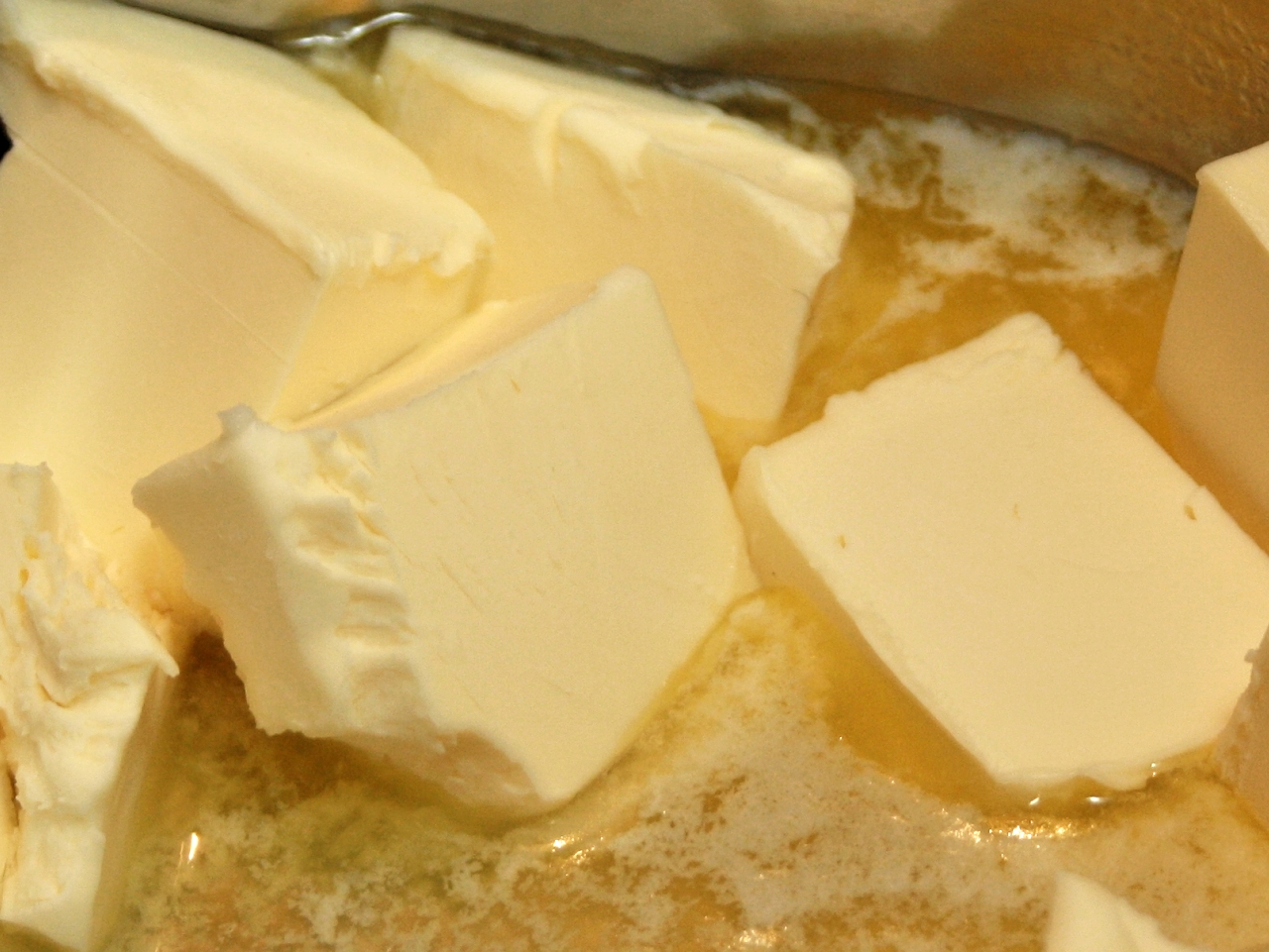 Švédský koláč naruby